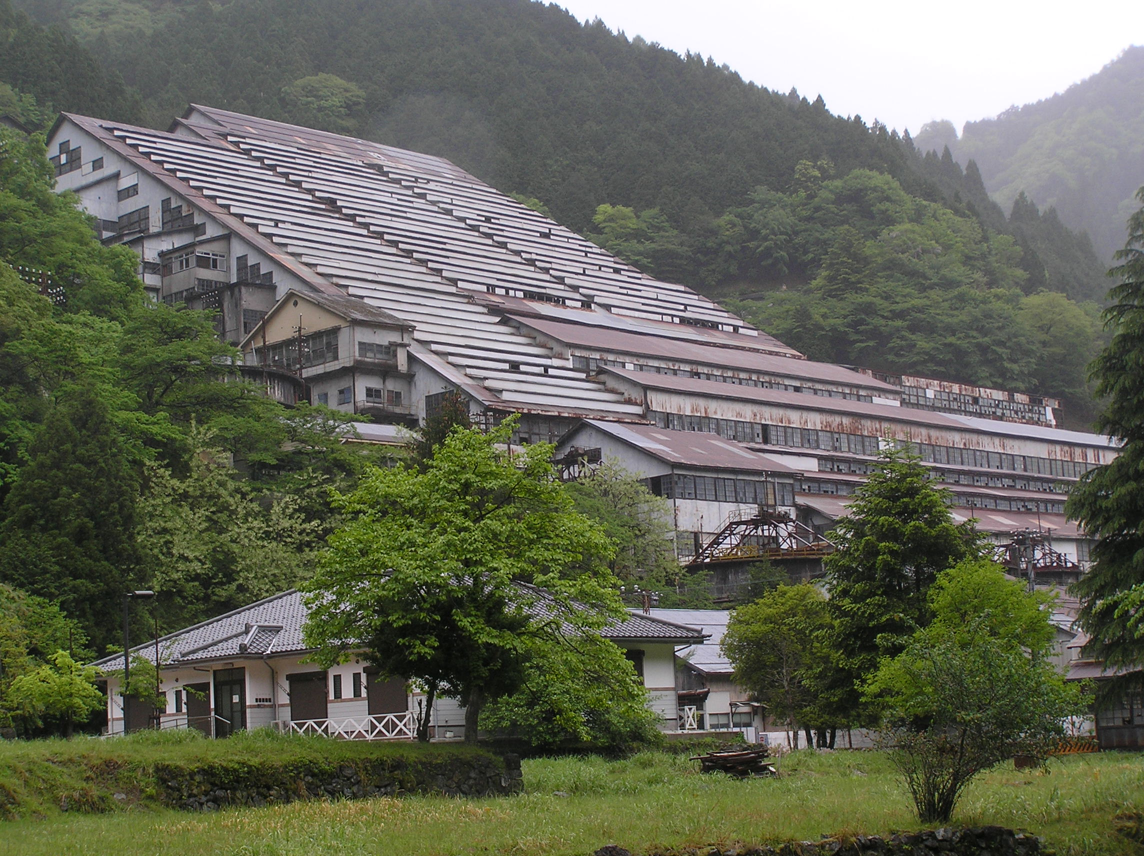 神子畑選鉱所,明延鉱業全景